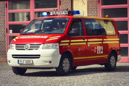 MZF